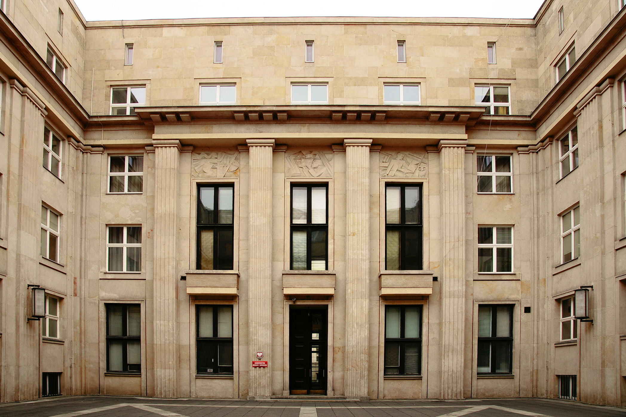 dziedziniec